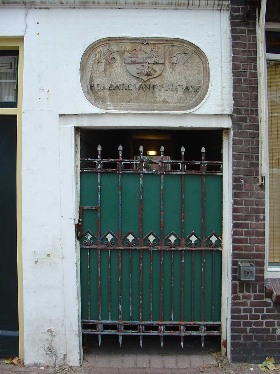 Het poortje van het voormalig hofje van Tams aan de Nieuwehaven te Gouda. Tekst boven het poortje:Fondatie van Maria Tams 1657